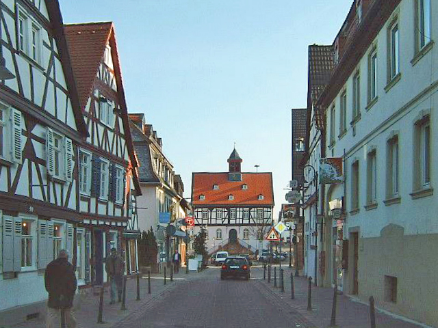 Bad Vilbel, town in Hesse. Here: main street